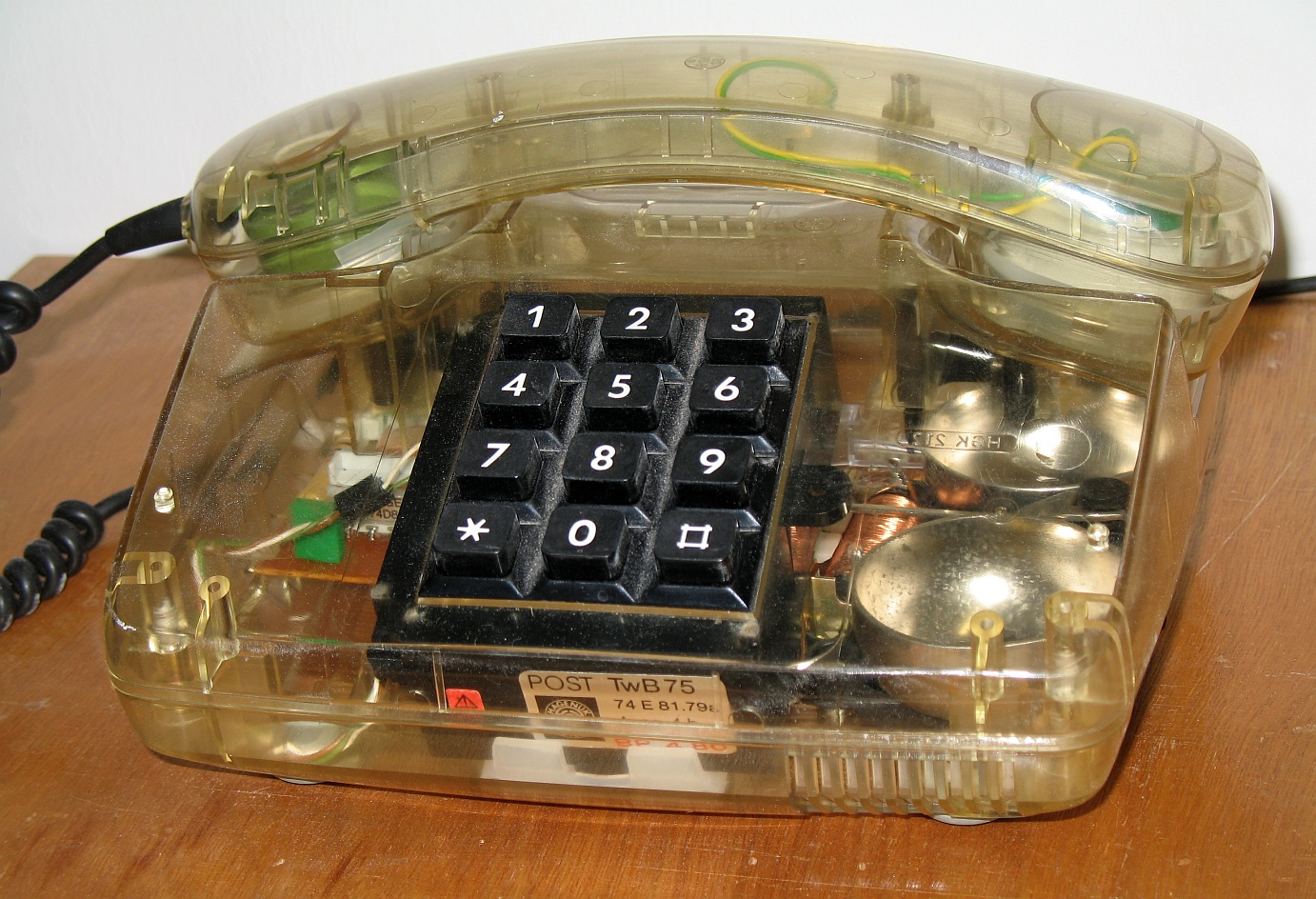 Transparenter Modetelefonapparat im Fernmeldemuseum Aachen